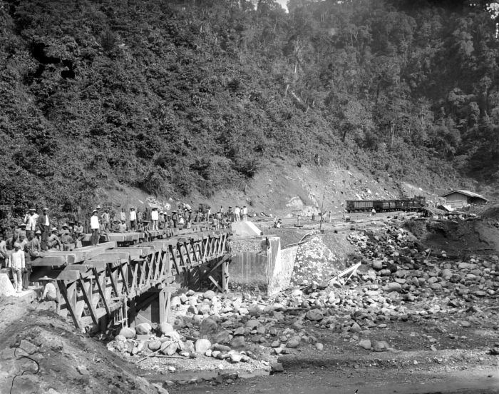 Negatief. Werknemers zijn bezig met herstel werzaamheden aan en van het spoor dat door de Aneikloof loopt op Sumatra. De spoorbrug wordt gerepareerd.. Verwoesting en herstel van het spoor in de Aneikloof, aan de westkust van Sumatra